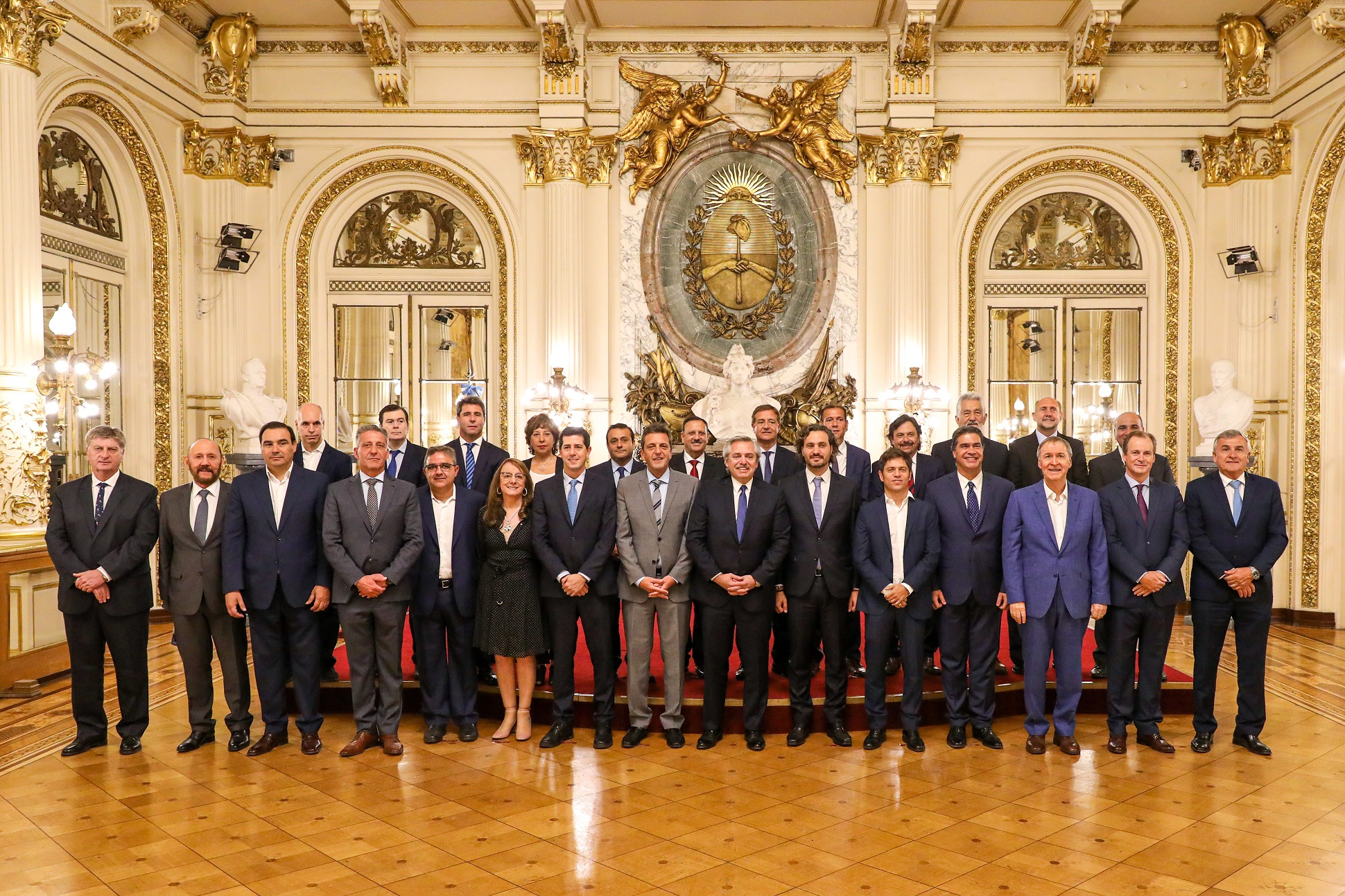 El presidente Alberto Fernández recibió hoy en Casa Rosada a los gobernadores de 22 provincias y al jefe de Gobierno de la Ciudad de Buenos Aires, a quienes convocó a celebrar un nuevo acuerdo para el Consenso Fiscal 2019. El mandatario encabezó además la firma de la suspensión del Pacto Fiscal hasta ahora vigente, para fortalecer las autonomías provinciales a través de la modificación de los compromisos asumidos entre el Estado nacional y las jurisdicciones. De la audiencia, que se realizó en el Salón Eva Perón, participaron también el jefe de Gabinete, Santiago Cafiero; el ministro del Interior, Eduardo De Pedro; y el presidente de la Cámara de Diputados, Sergio Massa. Estuvieron presentes los gobernadores de Buenos Aires, Axel Kicillof; Catamarca, Raúl Jalil; Chaco, Jorge Capitanich; Chubut, Mariano Arcioni; Córdoba, Juan Schiaretti; Corrientes, Gustavo Valdés; Entre Ríos, Gustavo Bordet, y Formosa, Gildo Insfrán. También participaron los mandatarios provinciales de Jujuy, Gerardo Morales; La Pampa, Sergio Ziliotto; La Rioja, Ricardo Quintela; Mendoza, Rodolfo Suárez; Misiones, Oscar Herrera Ahuad; Neuquén, Omar Gutiérrez, y Río Negro, Arabela Carreras. Concurrieron los gobernadores de Salta, Gustavo Sáenz; San Juan, Sergio Uñac; San Luis, Alberto Rodríguez Saá; Santa Cruz, Alicia Kirchner; Santa Fe, Omar Perotti; Santiago del Estero, Gerardo Zamora; Tucumán, Juan Manzur; y el jefe de Gobierno de la Ciudad de Buenos Aires, Horacio Rodríguez Larreta.